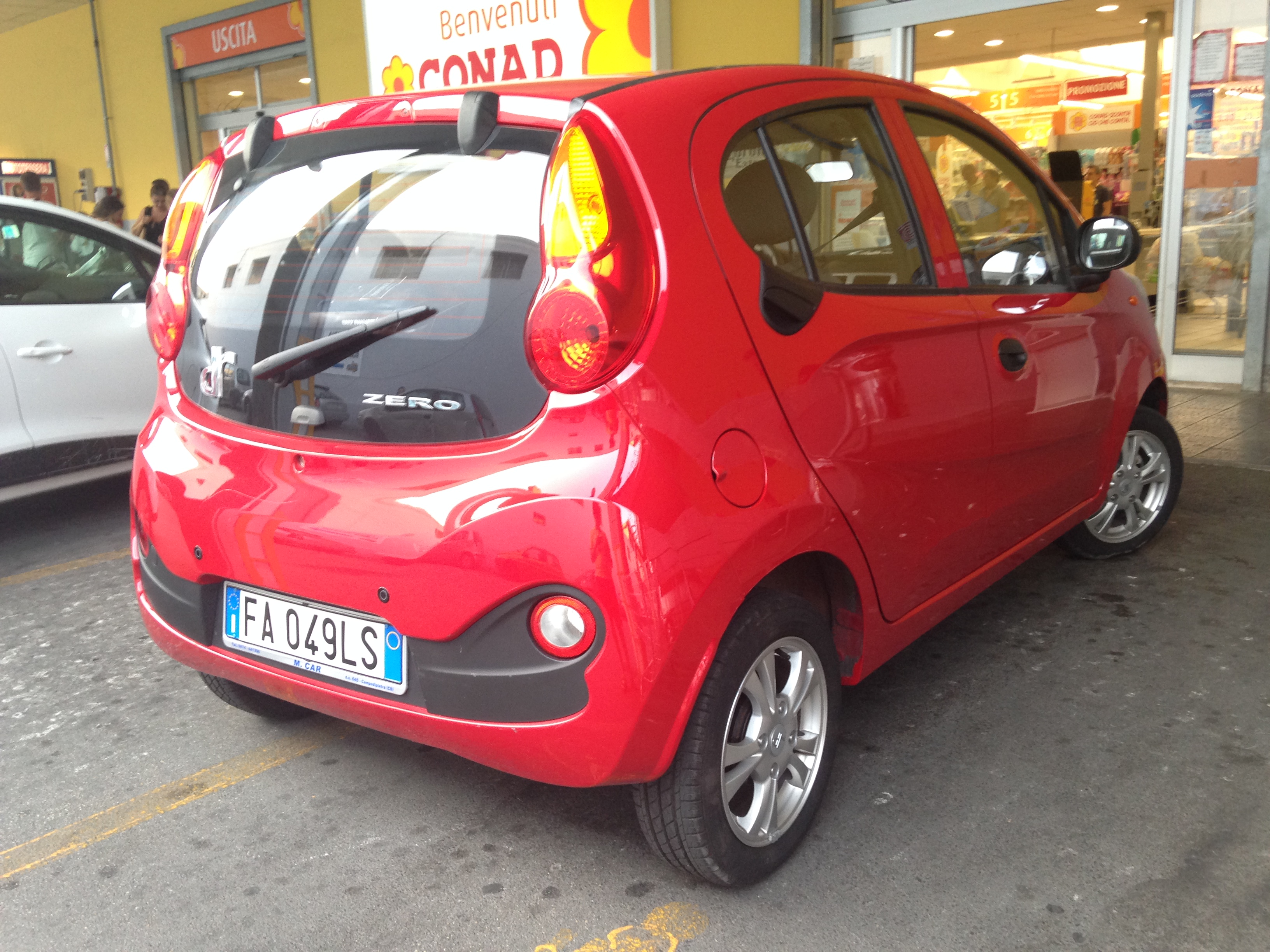 Dr Zero 2016 Retro